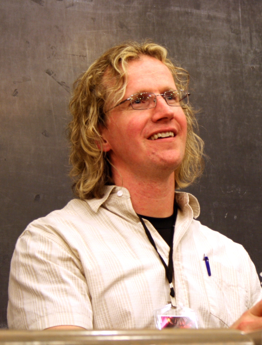 R. Scott Bakker na SFeraKonu 2009.